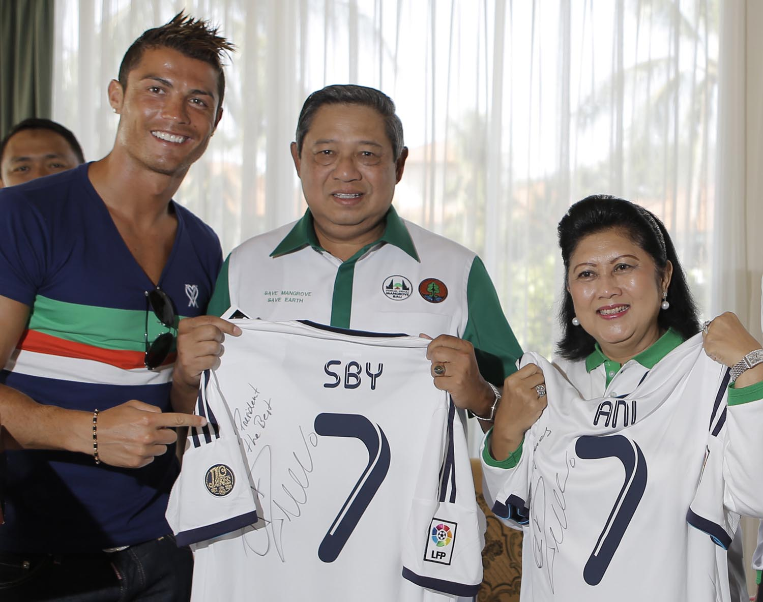 Presiden SBY dan Ibu Ani Yudhoyono merima kaus klub Real Madrid dengan nomor punggung milik Cristiano Ronaldo usai acara penanaman bakau di Nusa Dua, Bali, 26 Juni 2013.